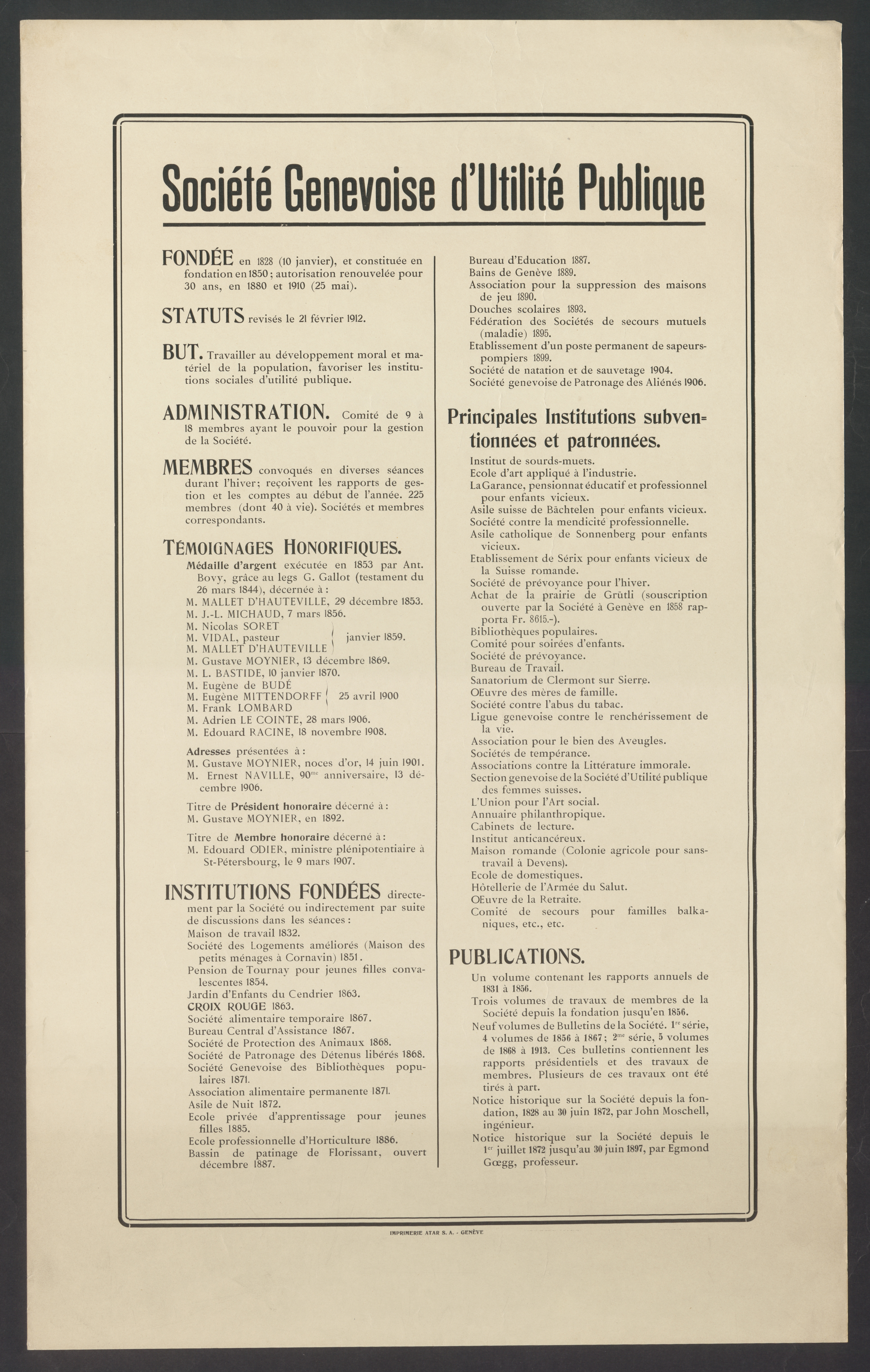 Tableau historique de la SGUP, de la fondation en 1828 et des principales réalisations jusqu'en 1914, conservé dans les archives privées de la société, déposées aux Archives d'Etat de Genève sous la cote A.E.G., Archives privées 241.8.1.